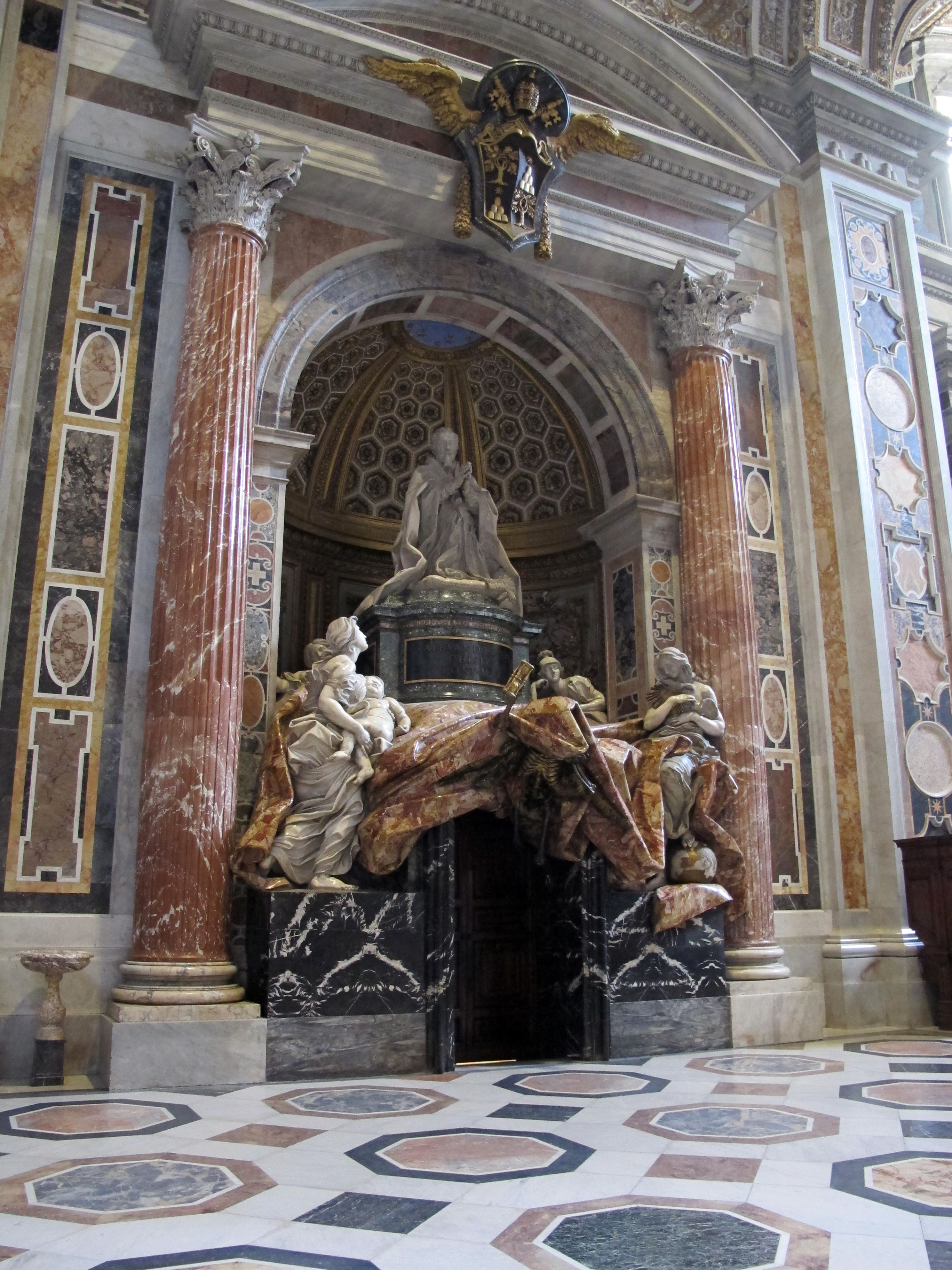 Basilica di San Pietro in Vaticano